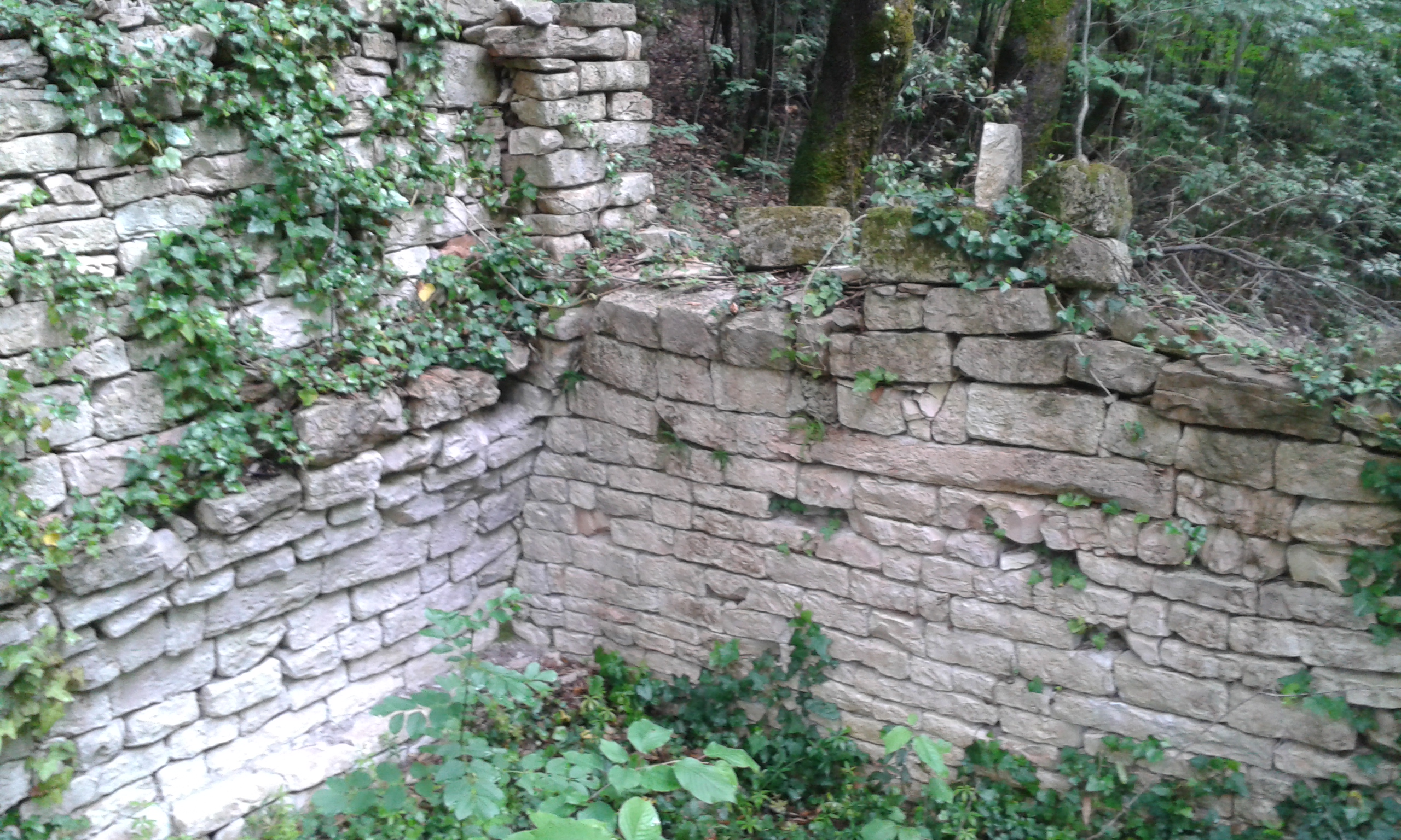 Montefortino, Vetice: ruderi dell'antica Chiesa di San Chiodo (San Claudio)